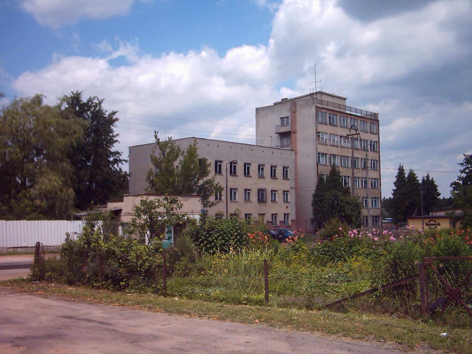 Biurowiec "Hamech" - Hajnówka